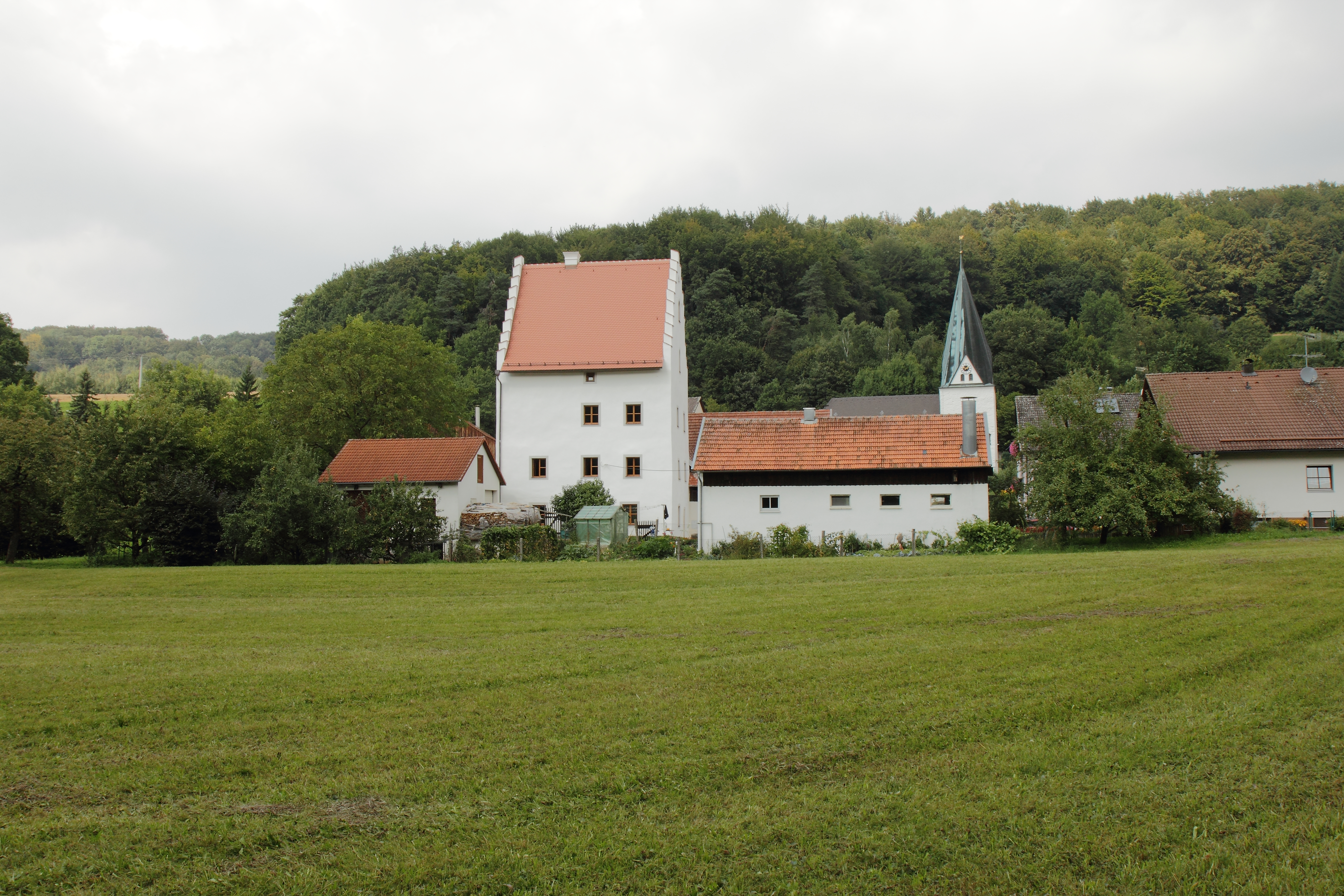 Oberrohrenstadt, St.-Colomann-Straße 18: Ehemaliges Schloss, dreigeschossiges und giebelständiges Weiherhaus mit Satteldach, Treppengiebel und Restspuren des umlaufenden Wassergrabens, spätgotisch, 1495 (dendro. dat.), Umbau 1719 (dendro. dat.)